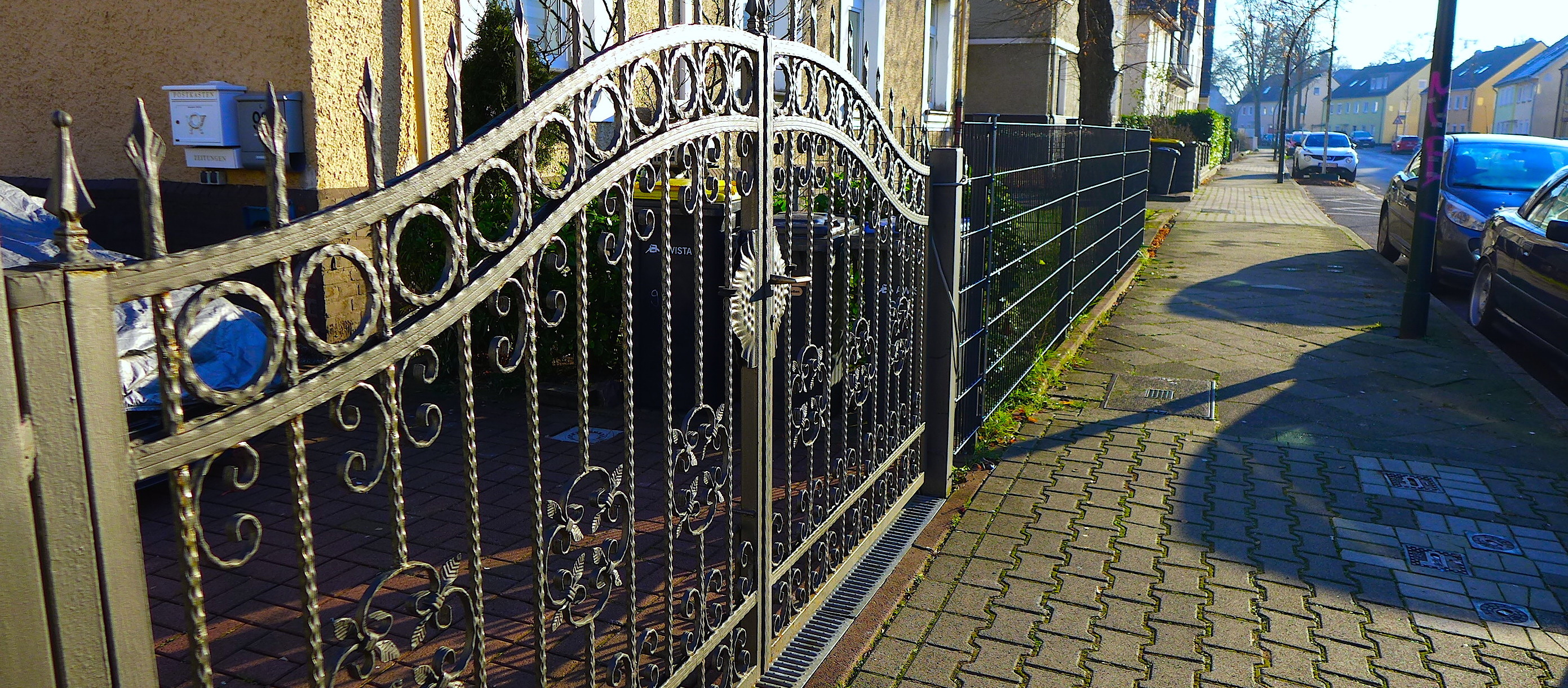 Улица Ам Вальд в Бенрате (Дюссельдорф) 21 января 2019.